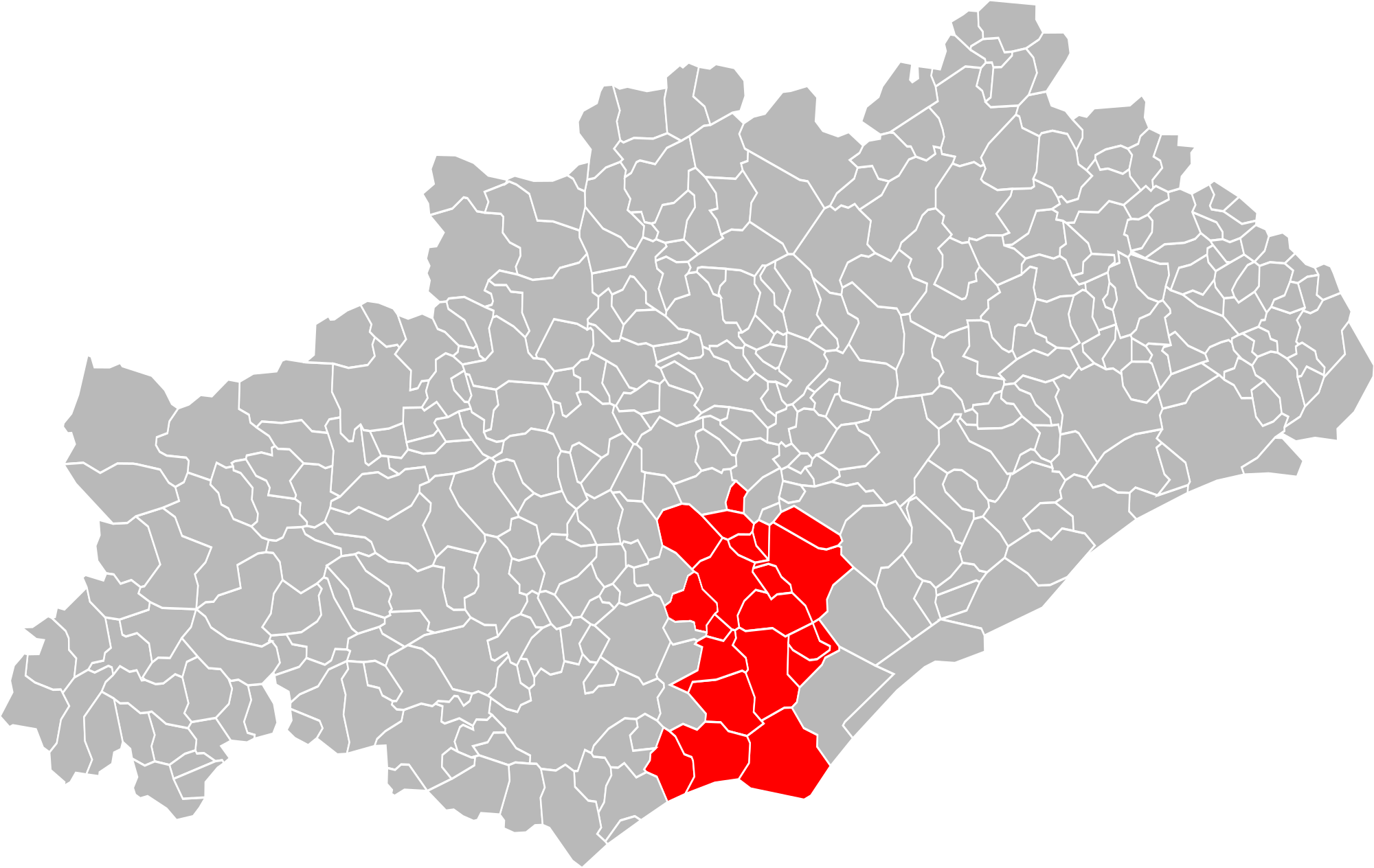 Localisation EPCI Hérault Méditerranée dans l'Hérault, France pour 2017